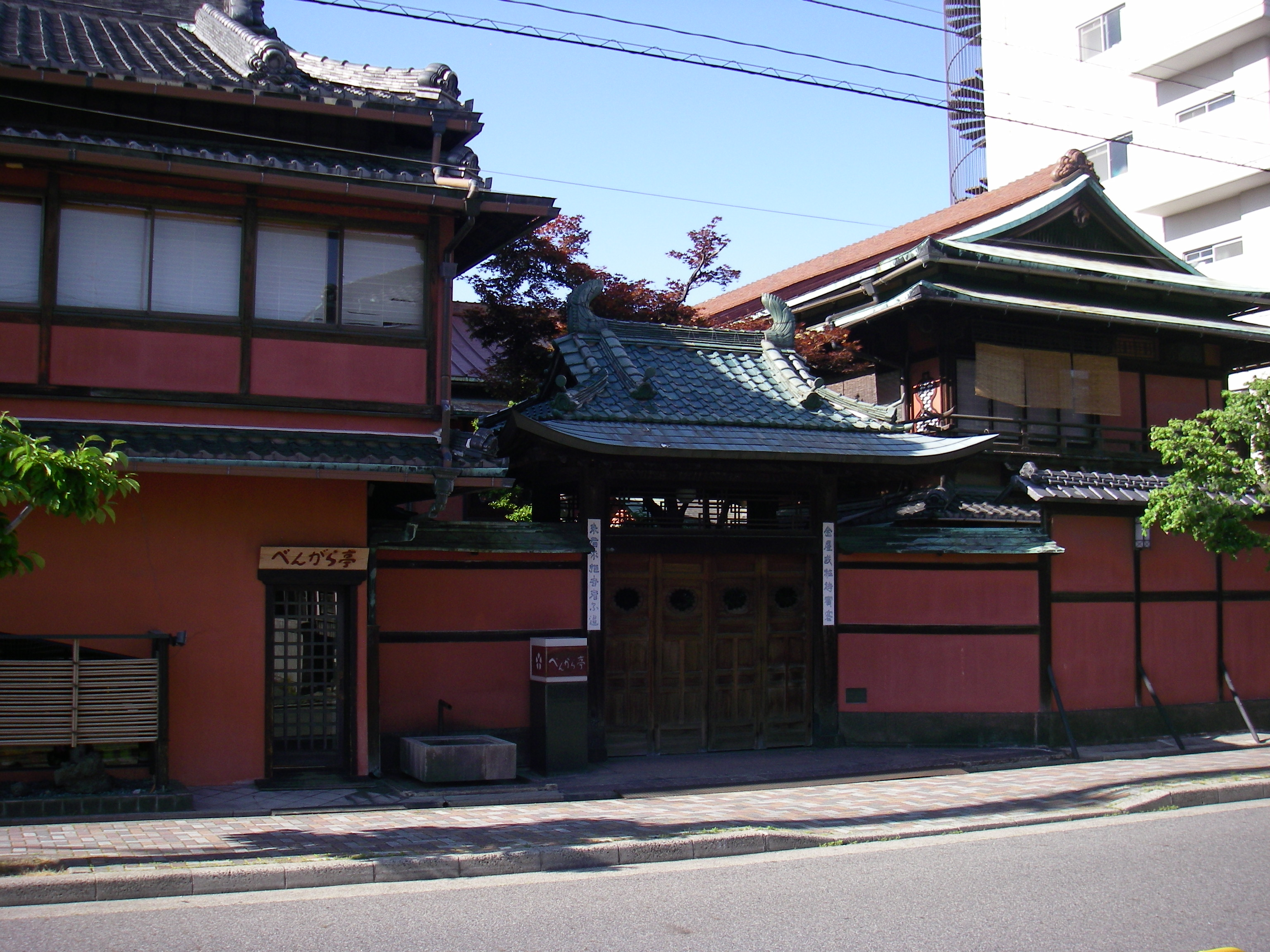 料亭稲本（愛知県名古屋市中村区） 名古屋市の都市景観重要建築物等に指定されている。